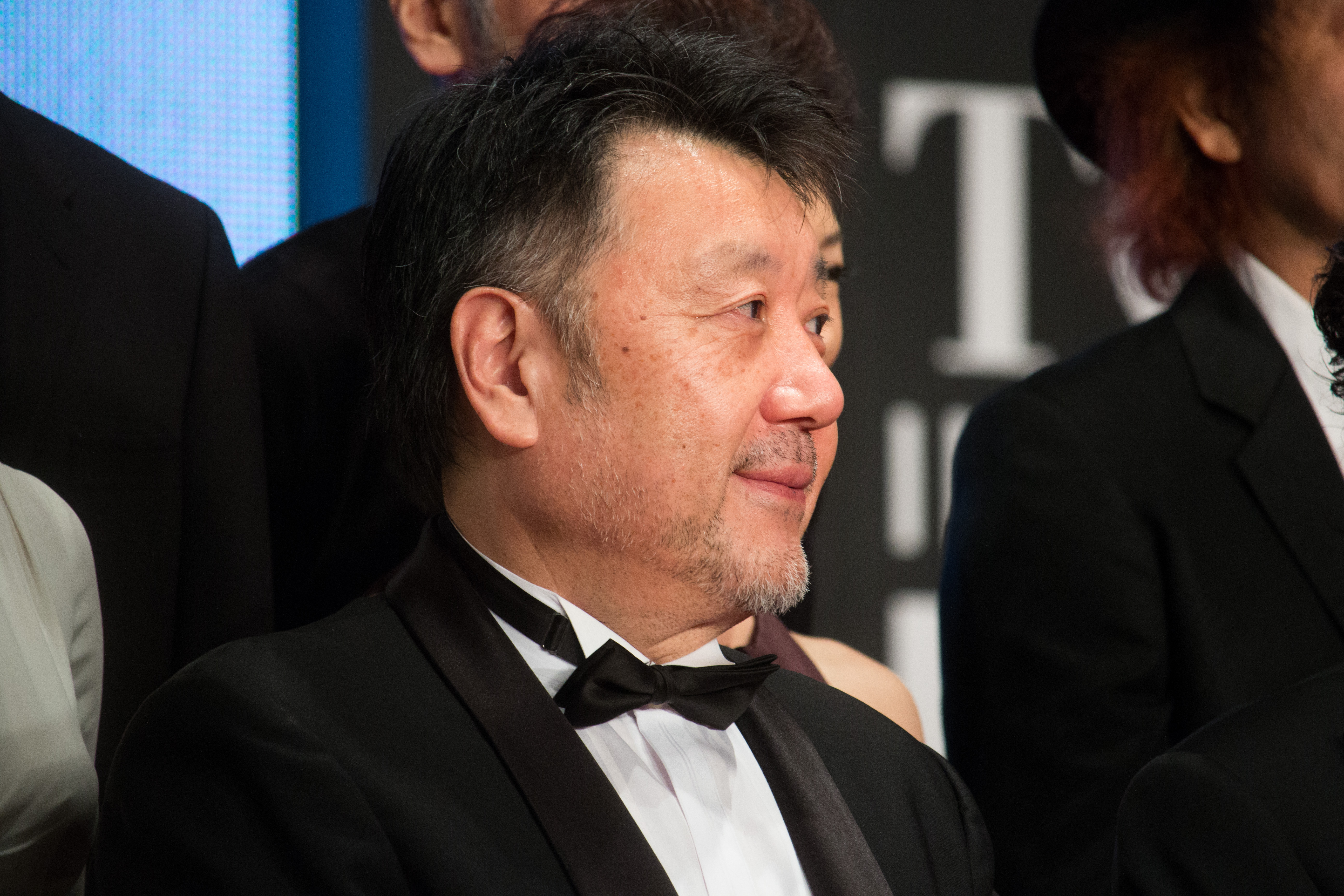 第28回 東京国際映画祭 オープニングセレモニー 原田眞人 (原田眞人の世界)